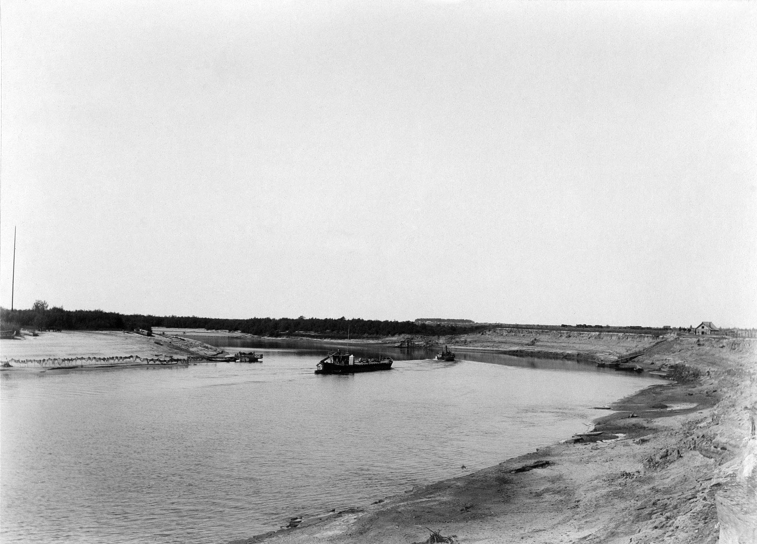 Река Тобол.1890.